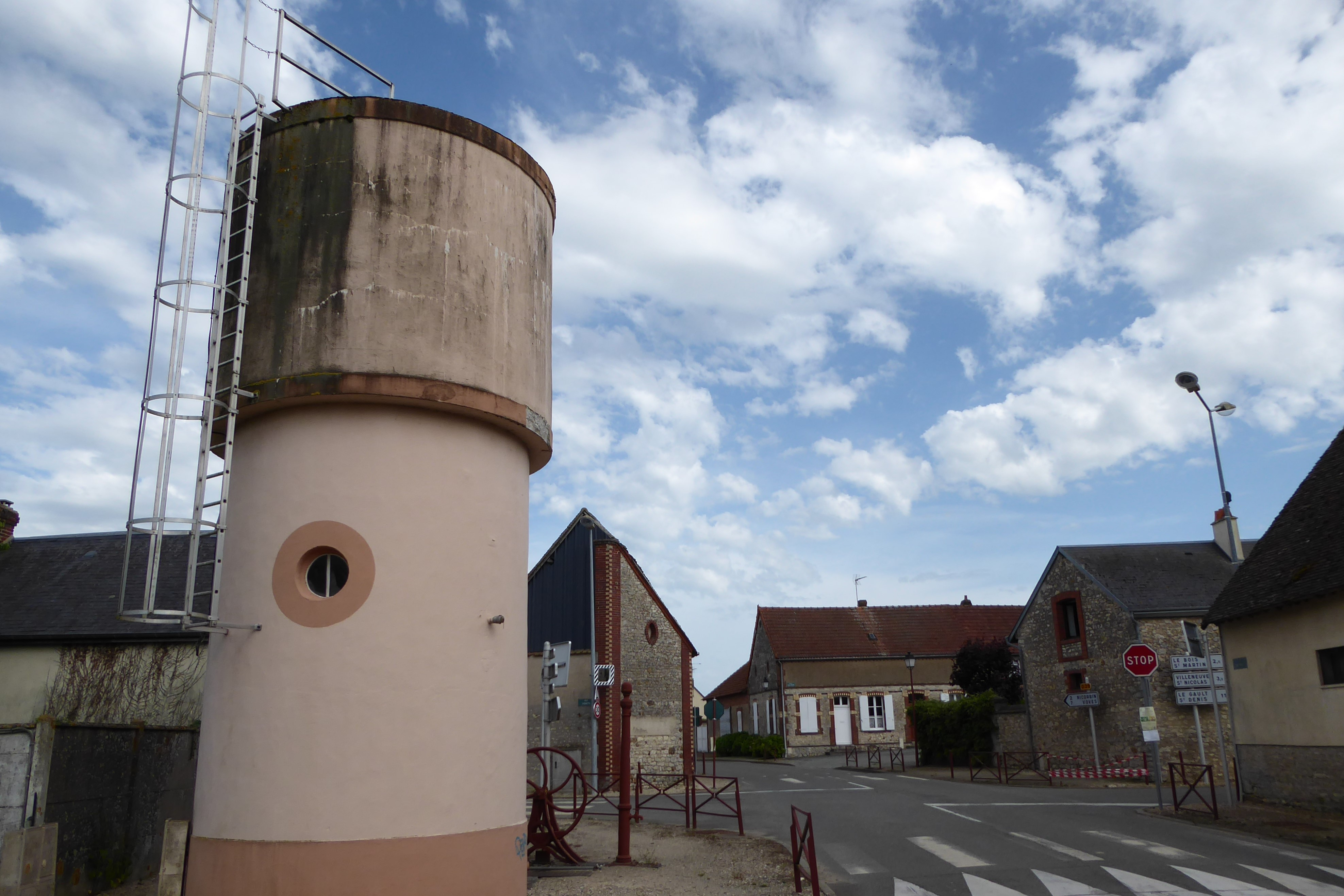 le château d'eau au carrefour de la D 29 et de la D 130, Pézy Eure-et-Loir, France.